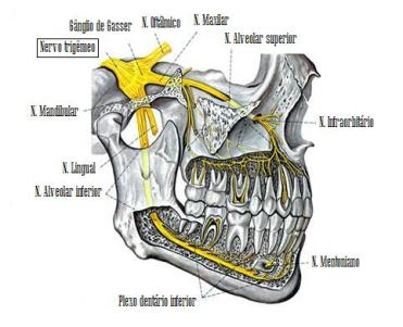 Sentido das fibras dos Nervos Maxilares (V2 e V3) e Mandibulares, além de seu trajeto sobre os alveolos dentais.